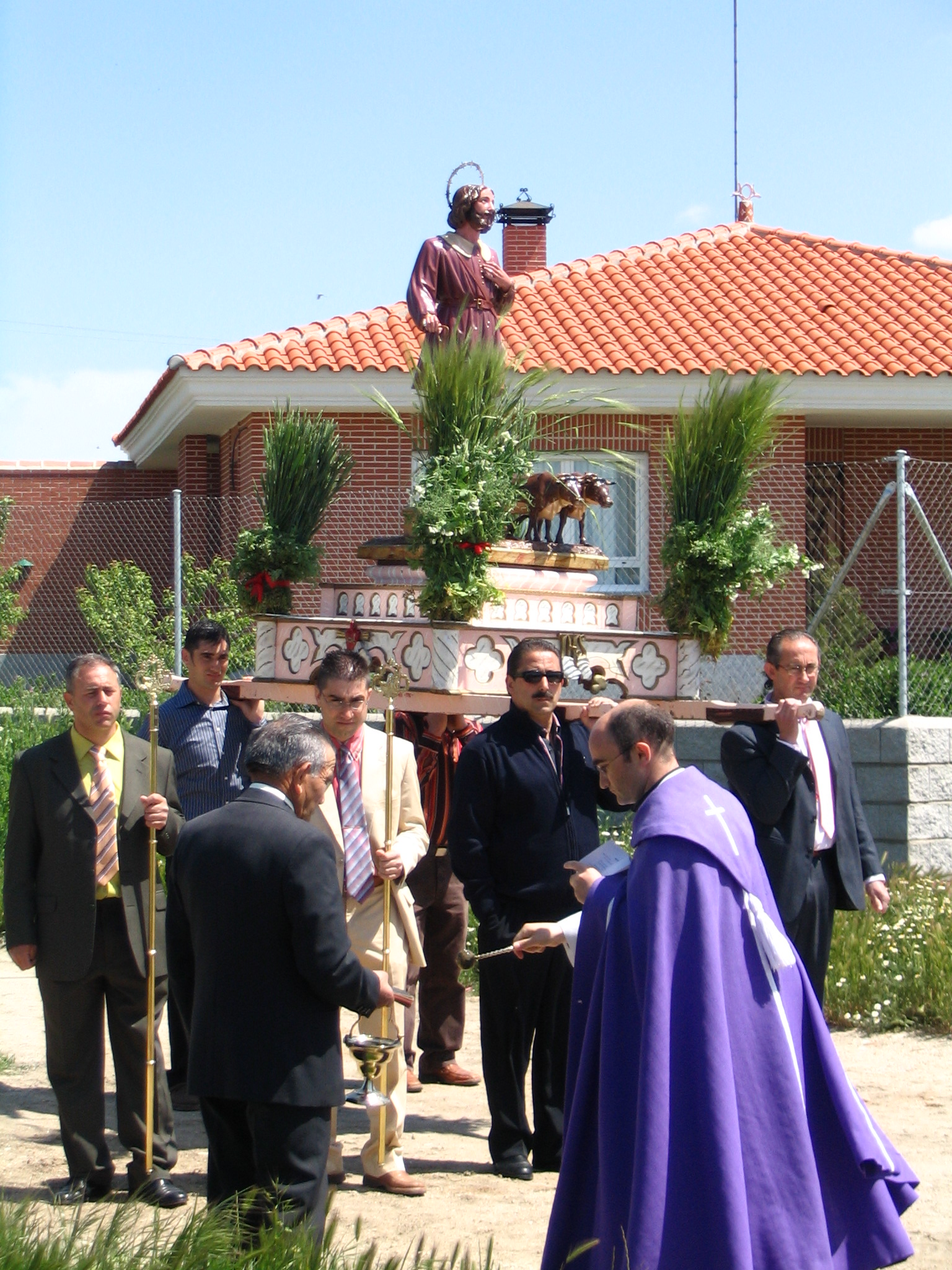 Bendición de campos durante la fiesta de San Isidro en Macotera. 2007